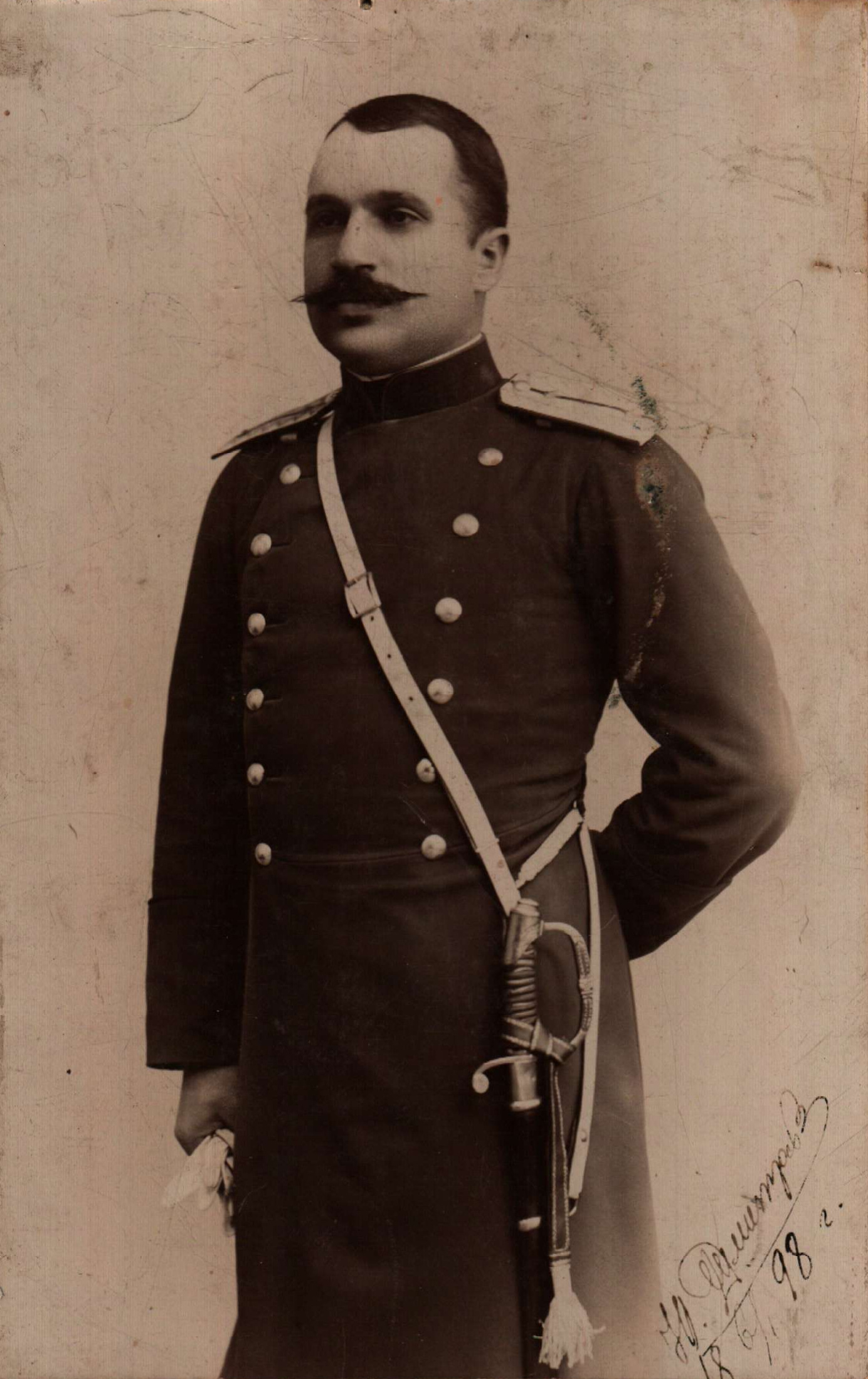 Снимка от фонда на Юрдан Стоянов.